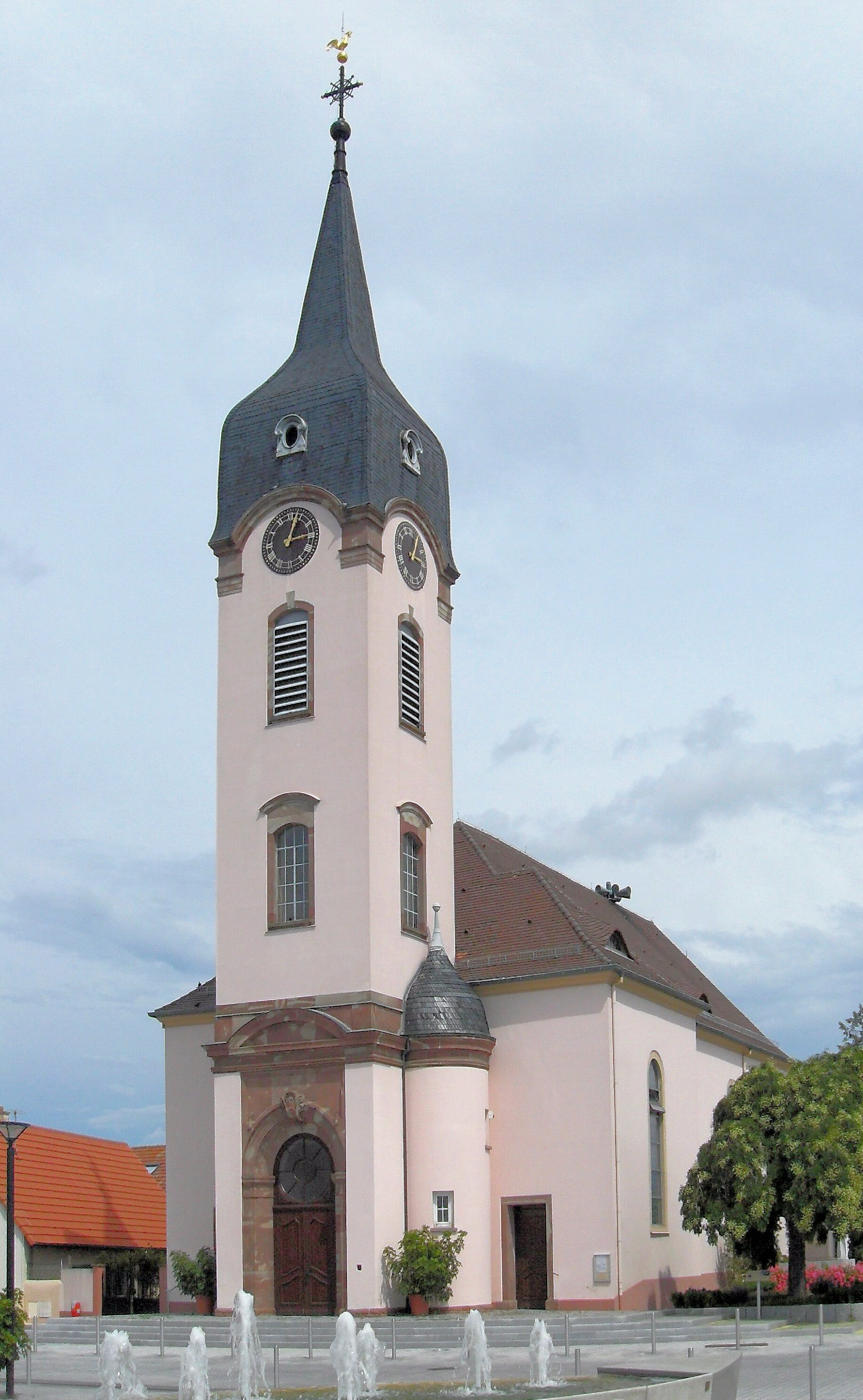 L'église Saint-Michel á Bantzenheim